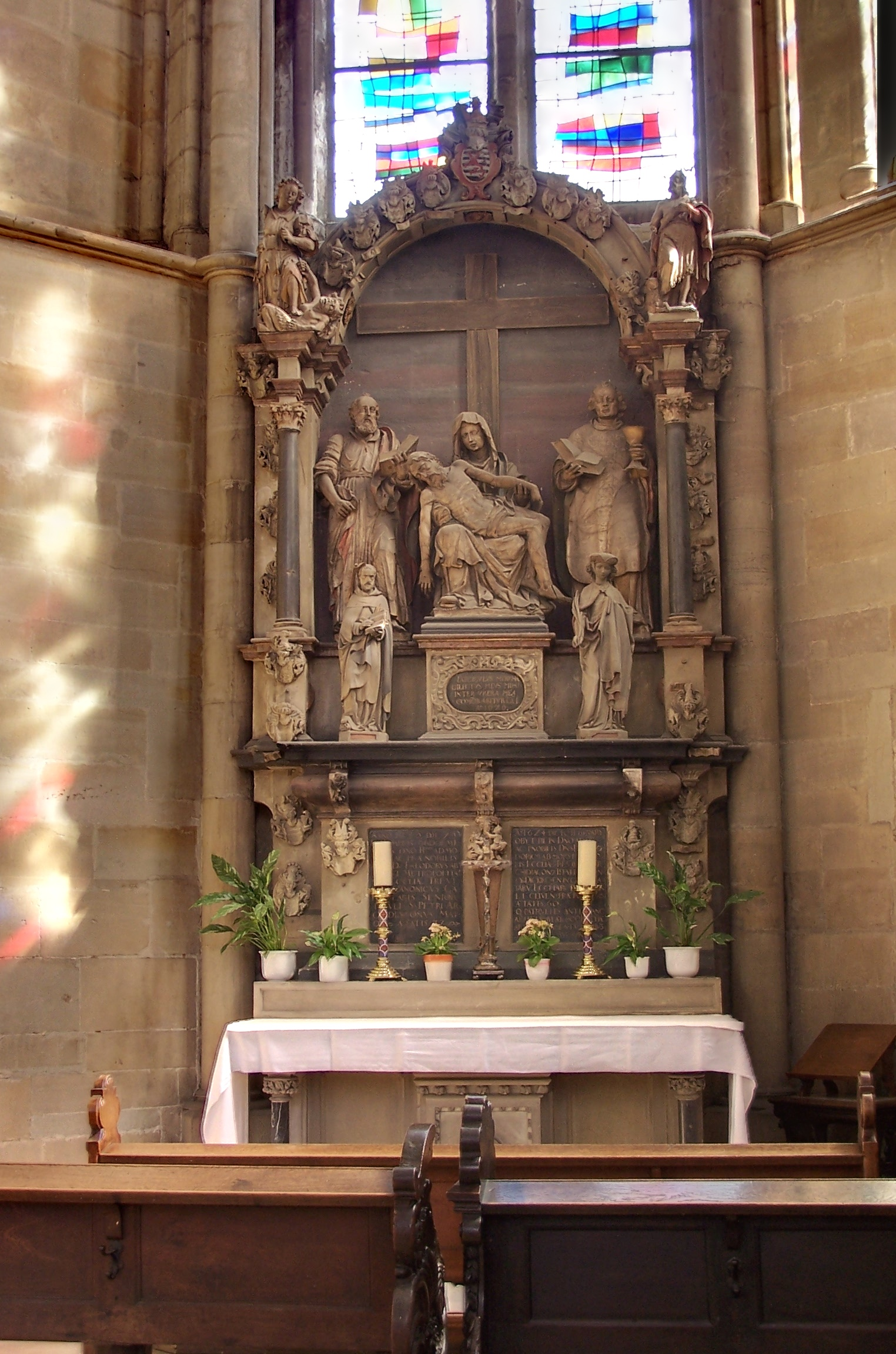 Liebfrauen Trier, Grabaltar der Vettern Theodor und Theoderich von Horst, 1620. Oben Paulus und St. Lubentius darunter der hl. Petrus Martyr und Apollonia